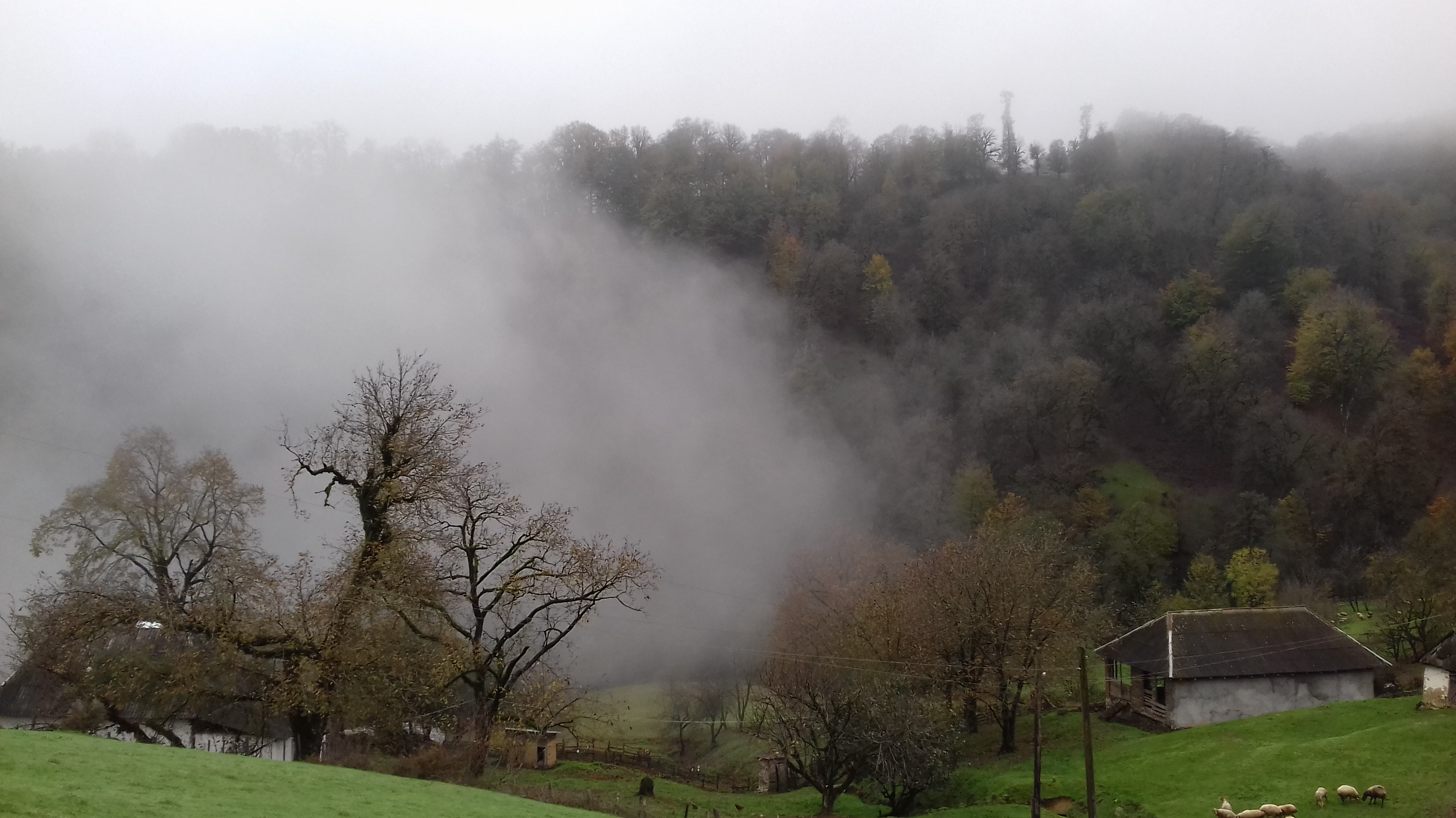 Hirkan National Park 4